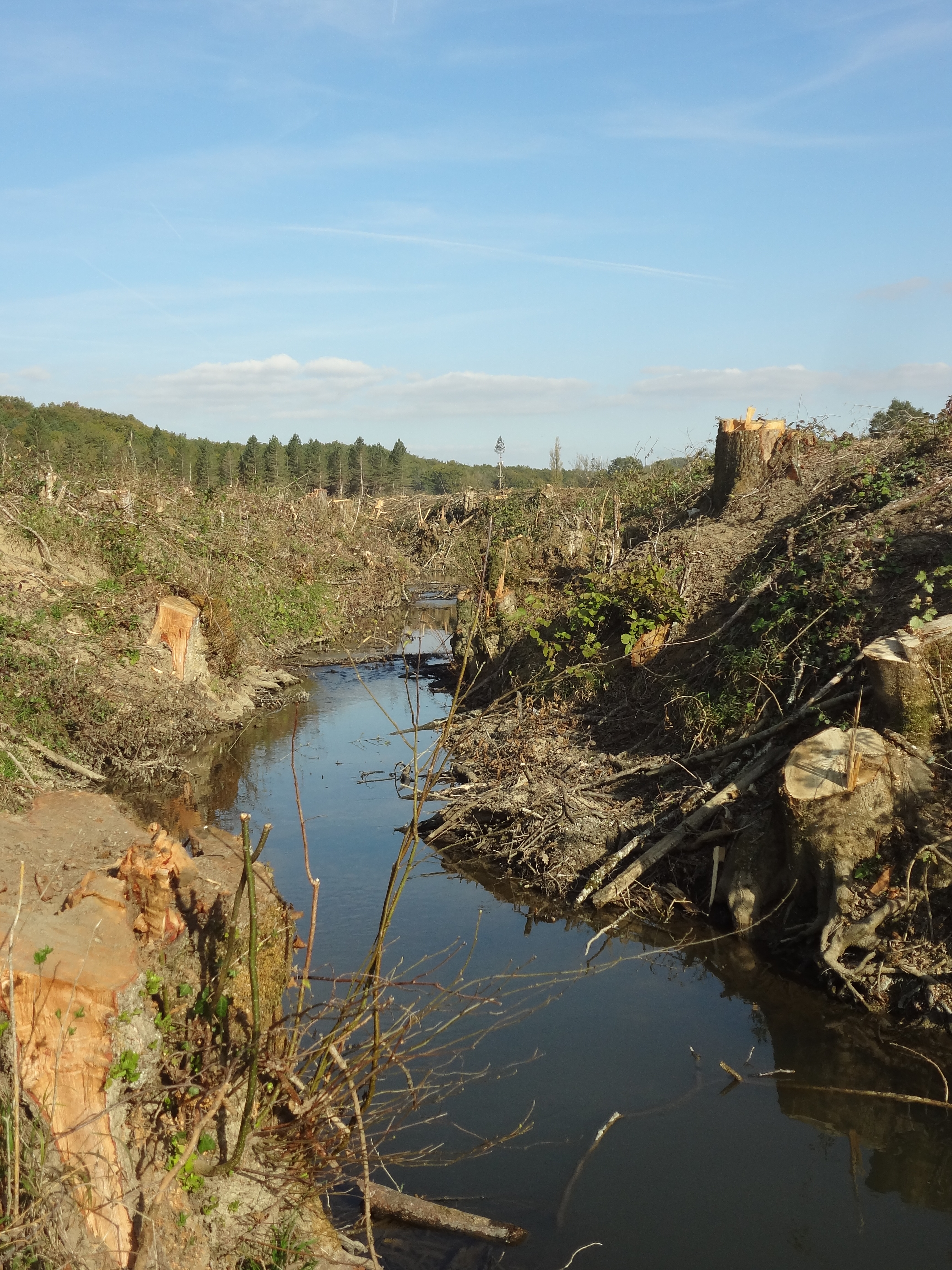 Zad du Testet - Ancienne ripisylve.